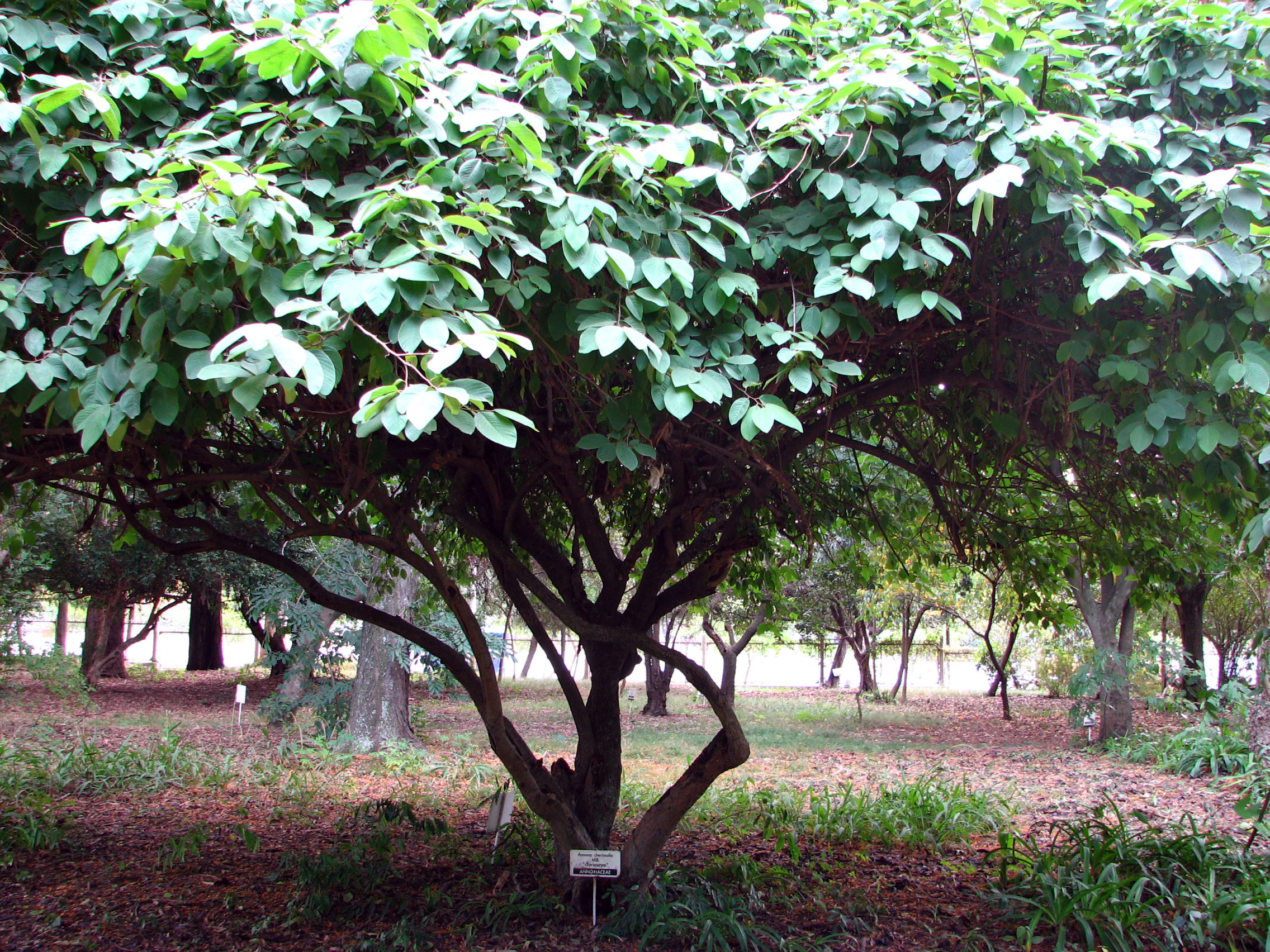 Ejemplar de Annona cherimola, en el Jardín Botánico de la ciudad de La Plata.